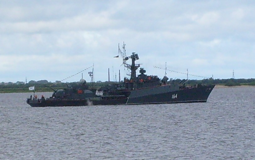 Малый противолодочный корабль «Онега», Северная Двина, Архангельск, 27 июля 2008